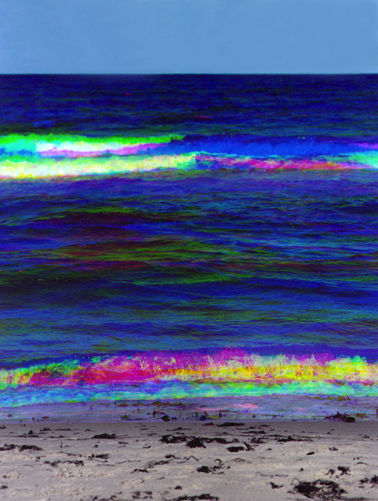 Hans Andree: Strobochromatogramm, 1985